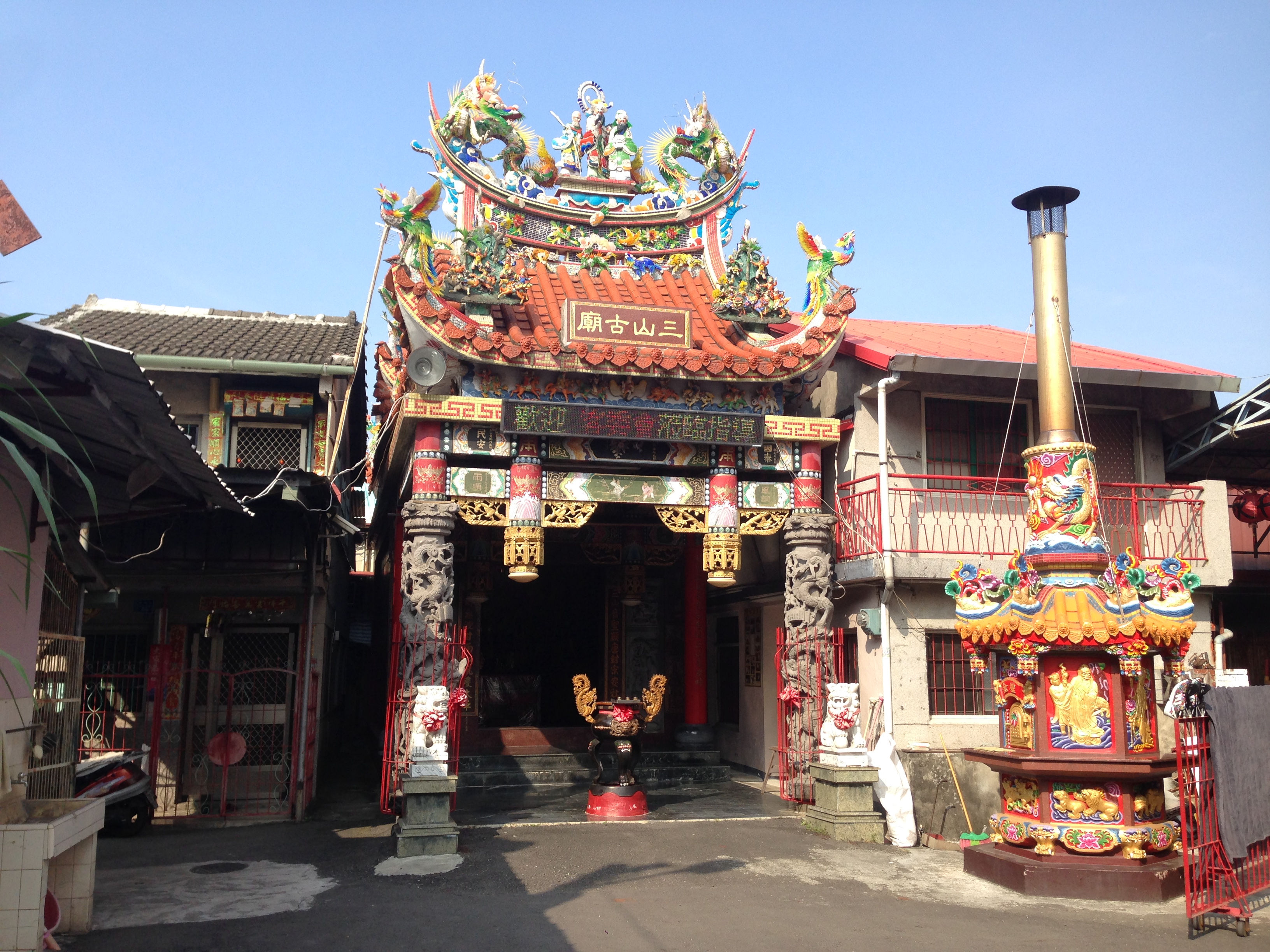 中文（台灣）: 林仔內三山國王廟